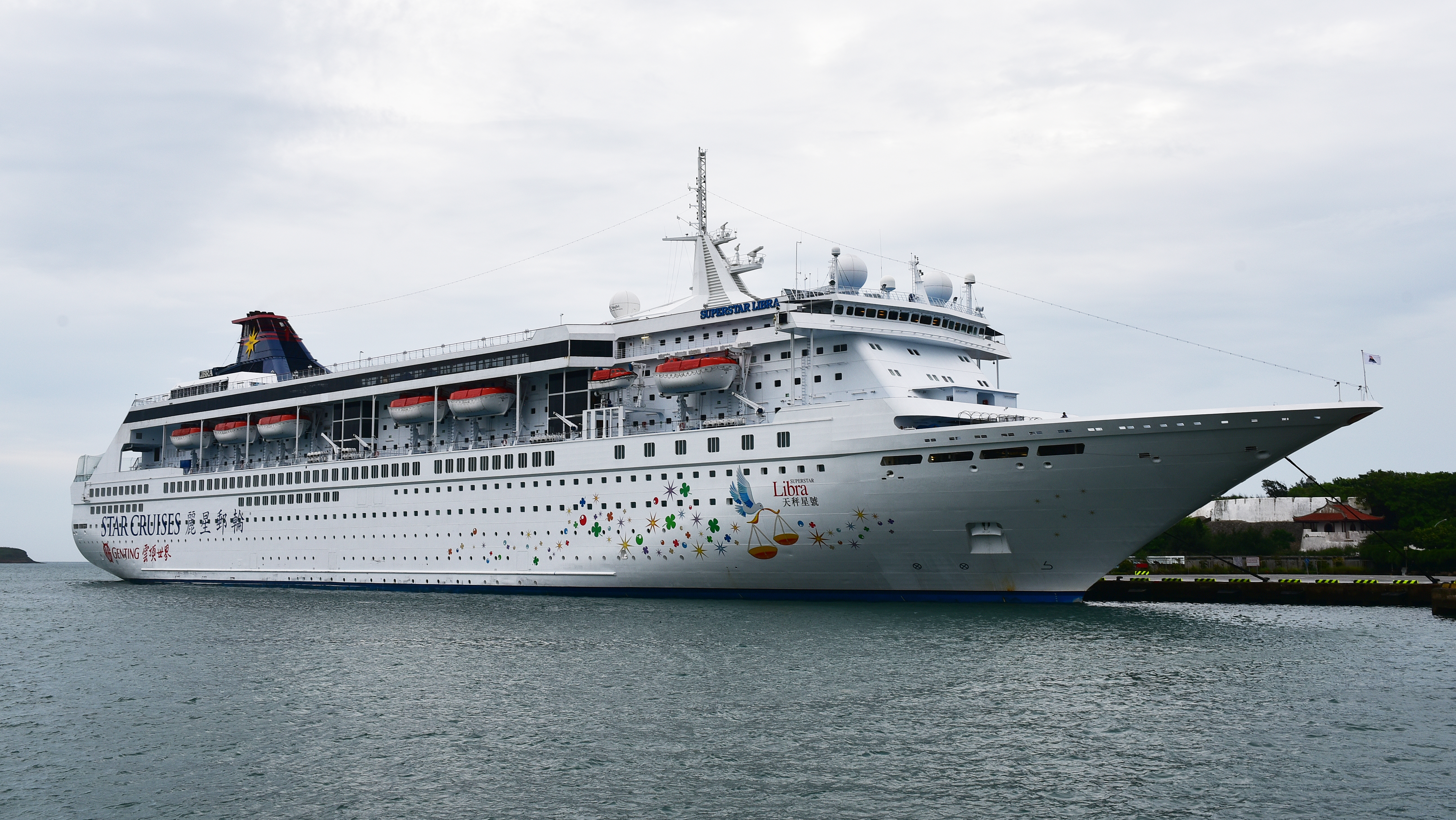 Superstar Libra